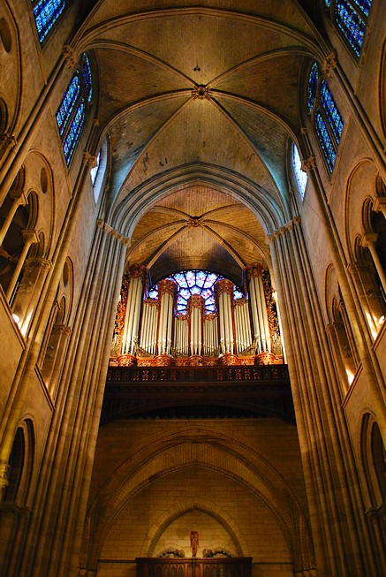 Grand orgue de Notre-Dame de Paris, France